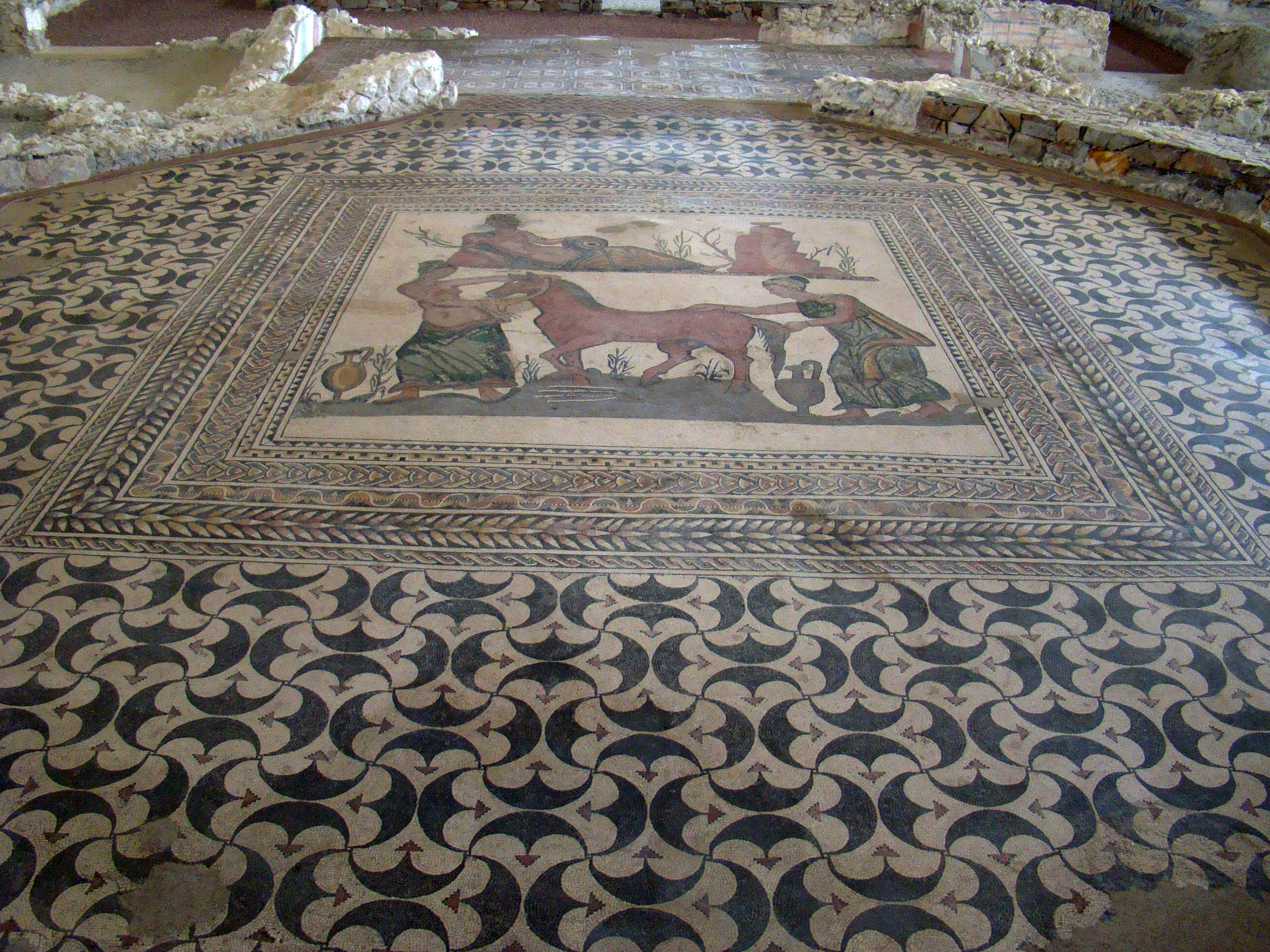 Villa romana de Almenara de Adaja, provincia de Valladolid (España). Mosaico de Pegaso en el salón familiar.